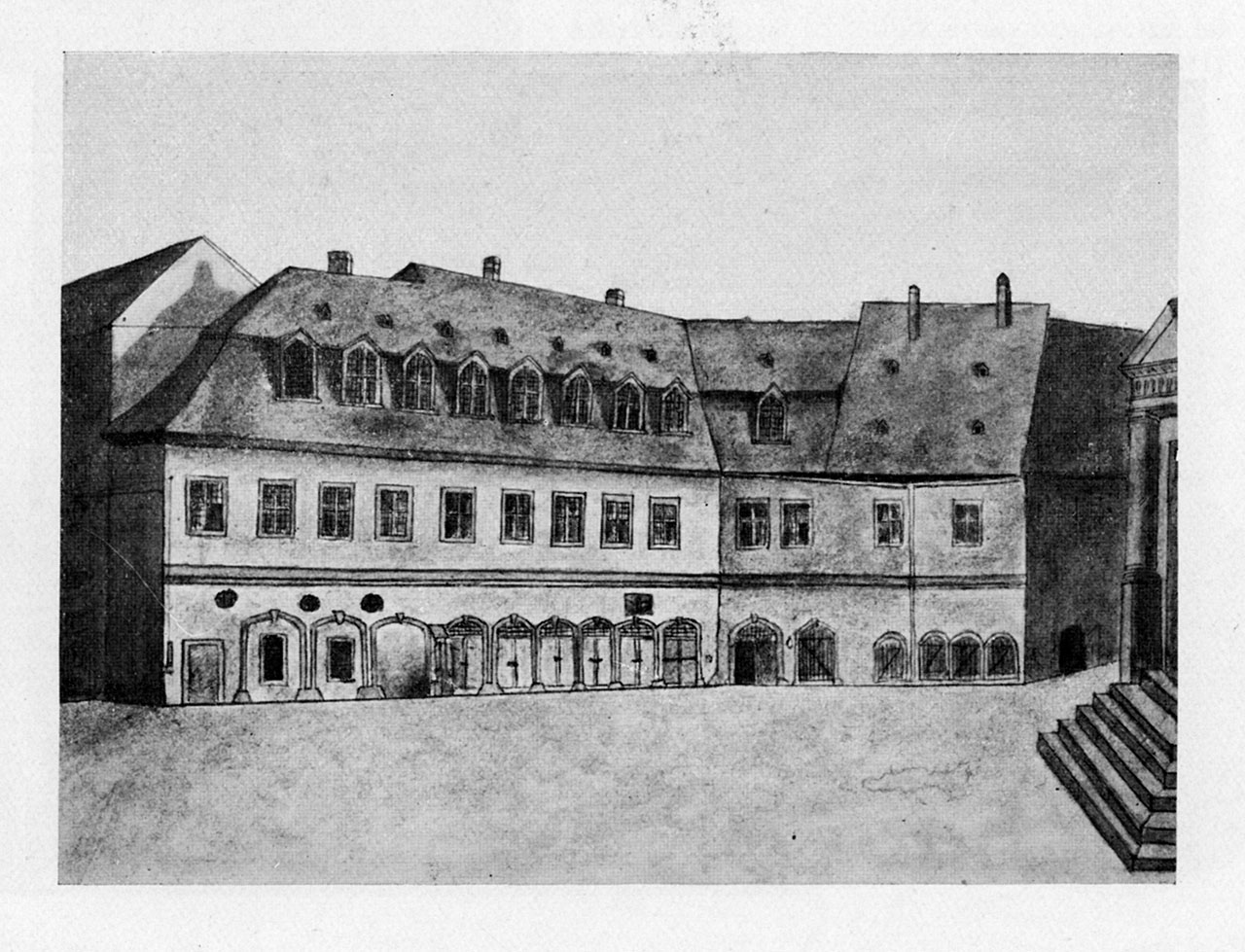 Ansicht des ehemaligen Barfüßerklosters (Städtisches Gymnasium bis 1839)